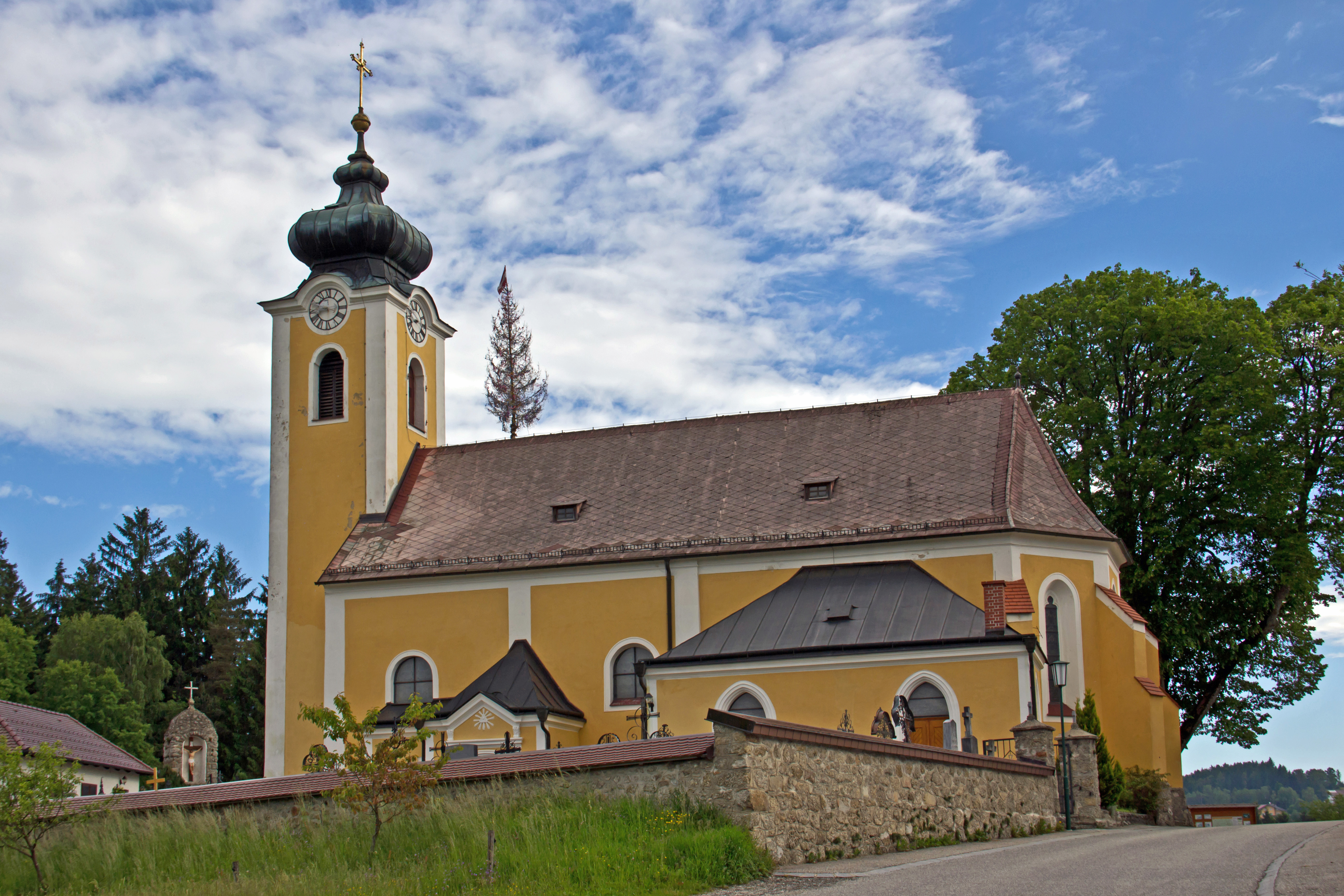 Die am östlichen Ortsrand etwas erhöht gelegene und von einem Friedhof umgebene Pfarrkirche hl. Ulrich ist ein schlichter, barockisierter Saalbau mit gotischem Chor und spätbarockem Westturm.